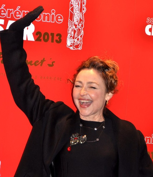 Catherine Frot à la cérémonie des César